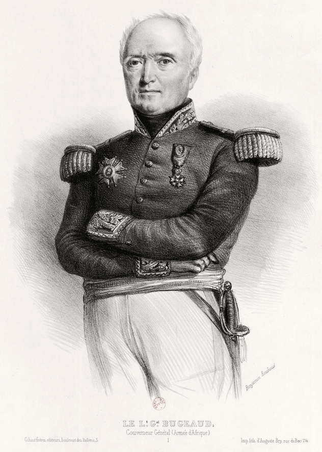 Bugeaud, vers 1843